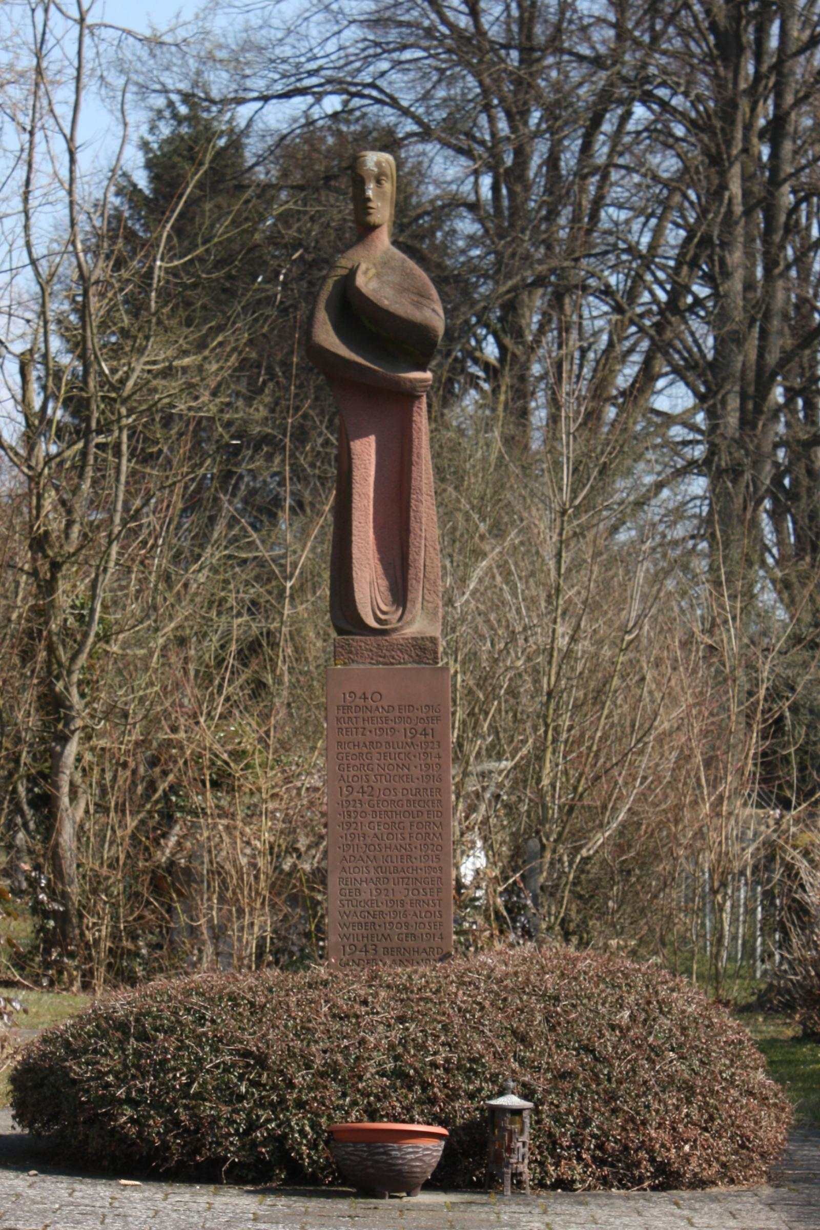 Ehrenmal neben der Kirche für die Gefallenen der Weltkriege in Hausen, Westerwald (Waldbrunn), Hessen, Deutschland